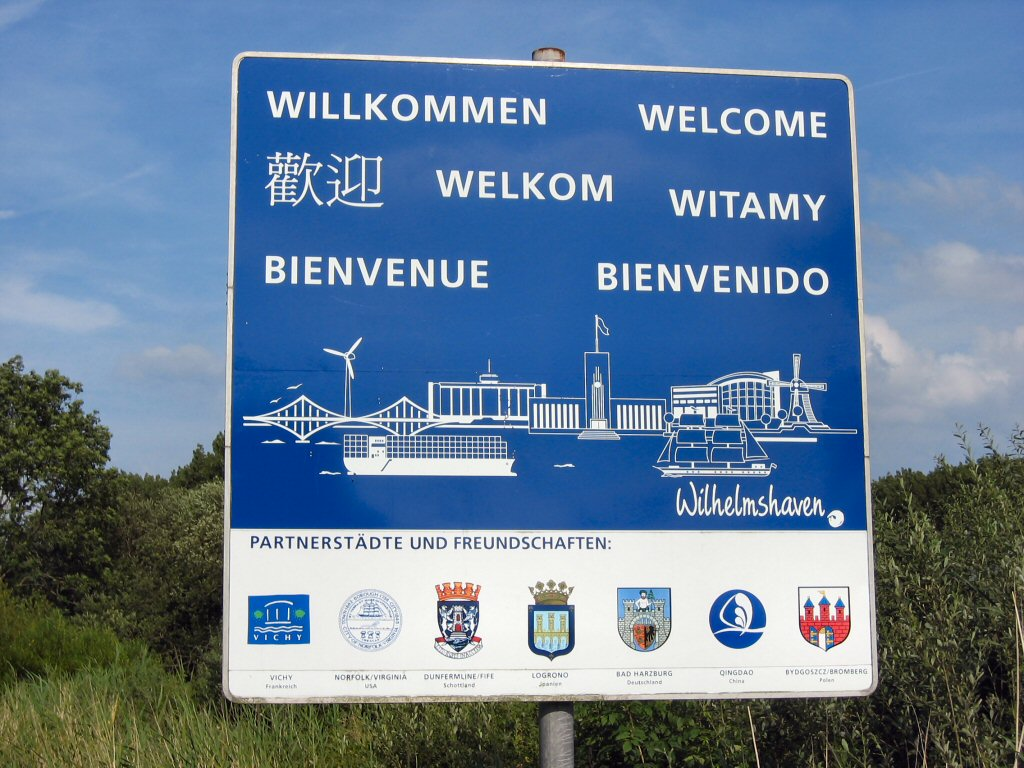 Wilhelmshaven, Willkommensschild mit den Partnerstädten und Städtefreundschaften